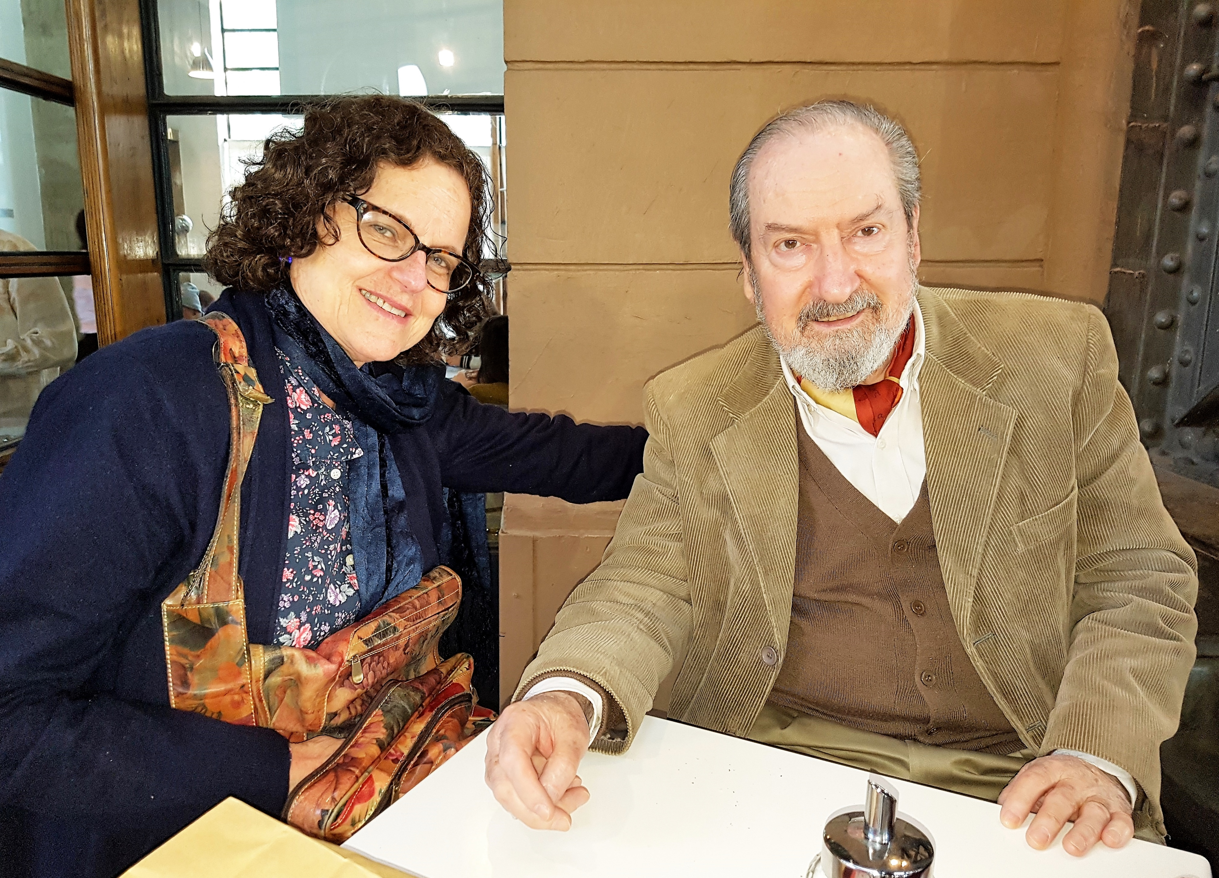 El poeta chileno Manuel Silva Acevedo con su esposa, la sicóloga Sabine Romero Bergdolt, en la Feria Internacional del Libro de Santiago 2017.